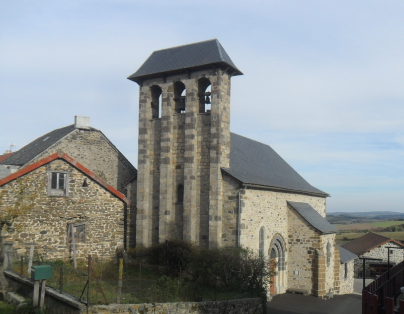 Église catholique de la commune de Rézentières dans le Cantal